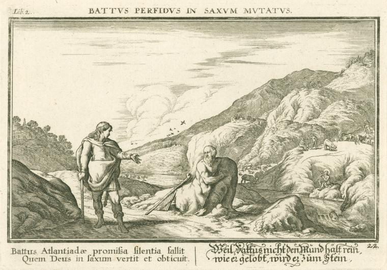 Mercurio tramuta Batto in roccia (illustrazione del Teatro di Ovidio di Johann Wilhelm Bauer)